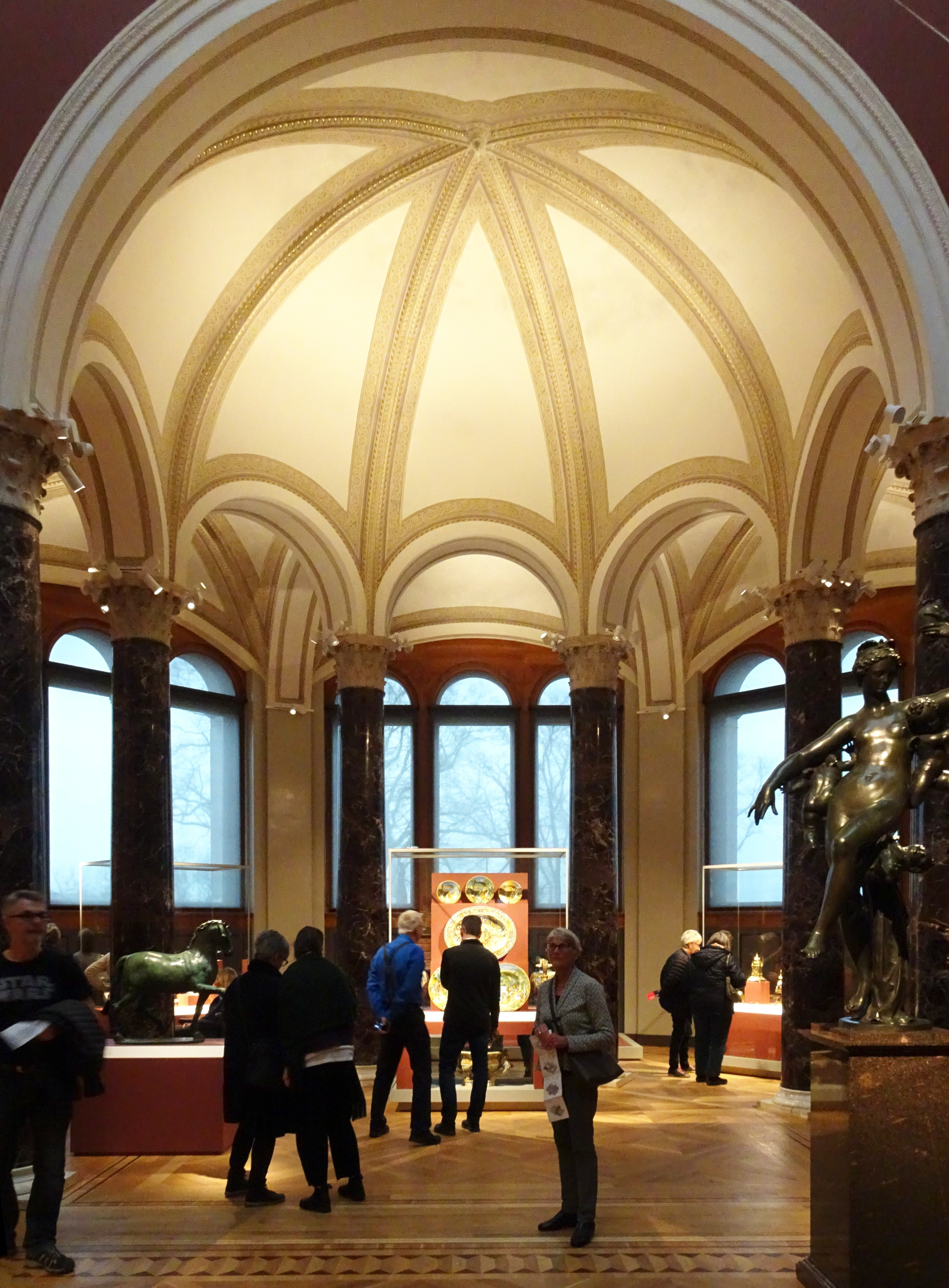 Nationalmuseum pelarsalen högst upp efter renoveringen